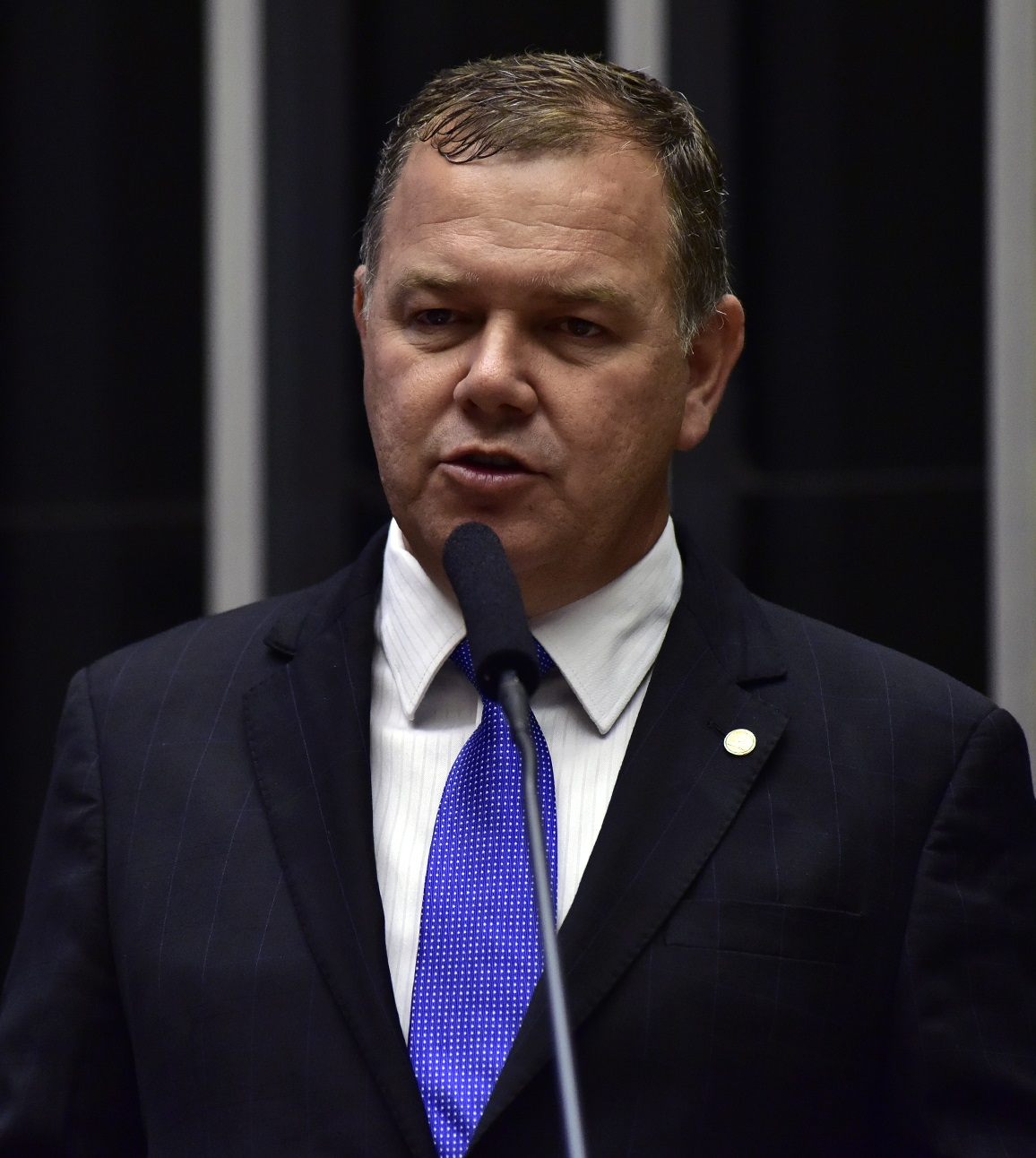 Lucio Mosquini em abril de 2016.